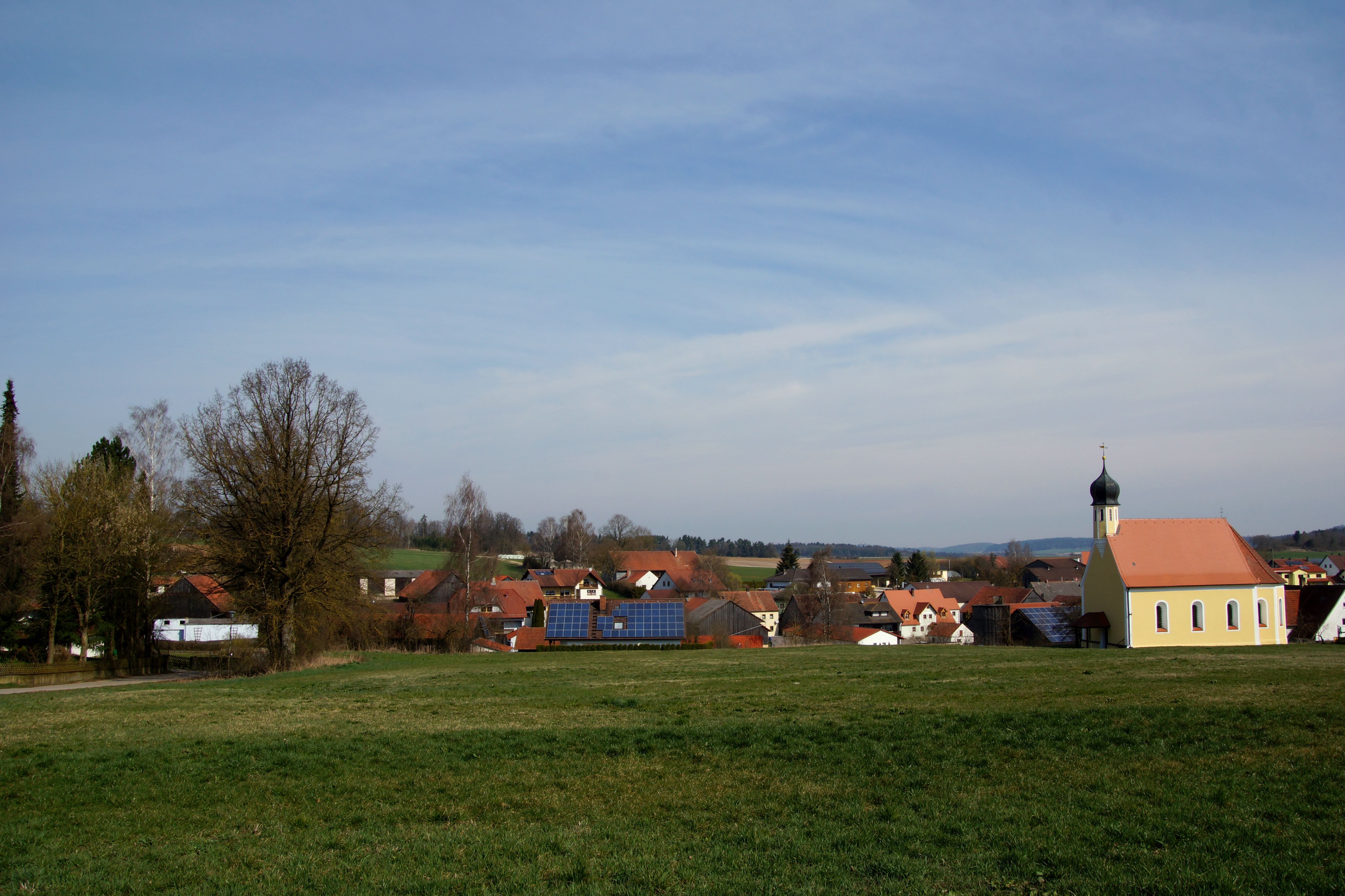 Harenzhofen bei Velburg